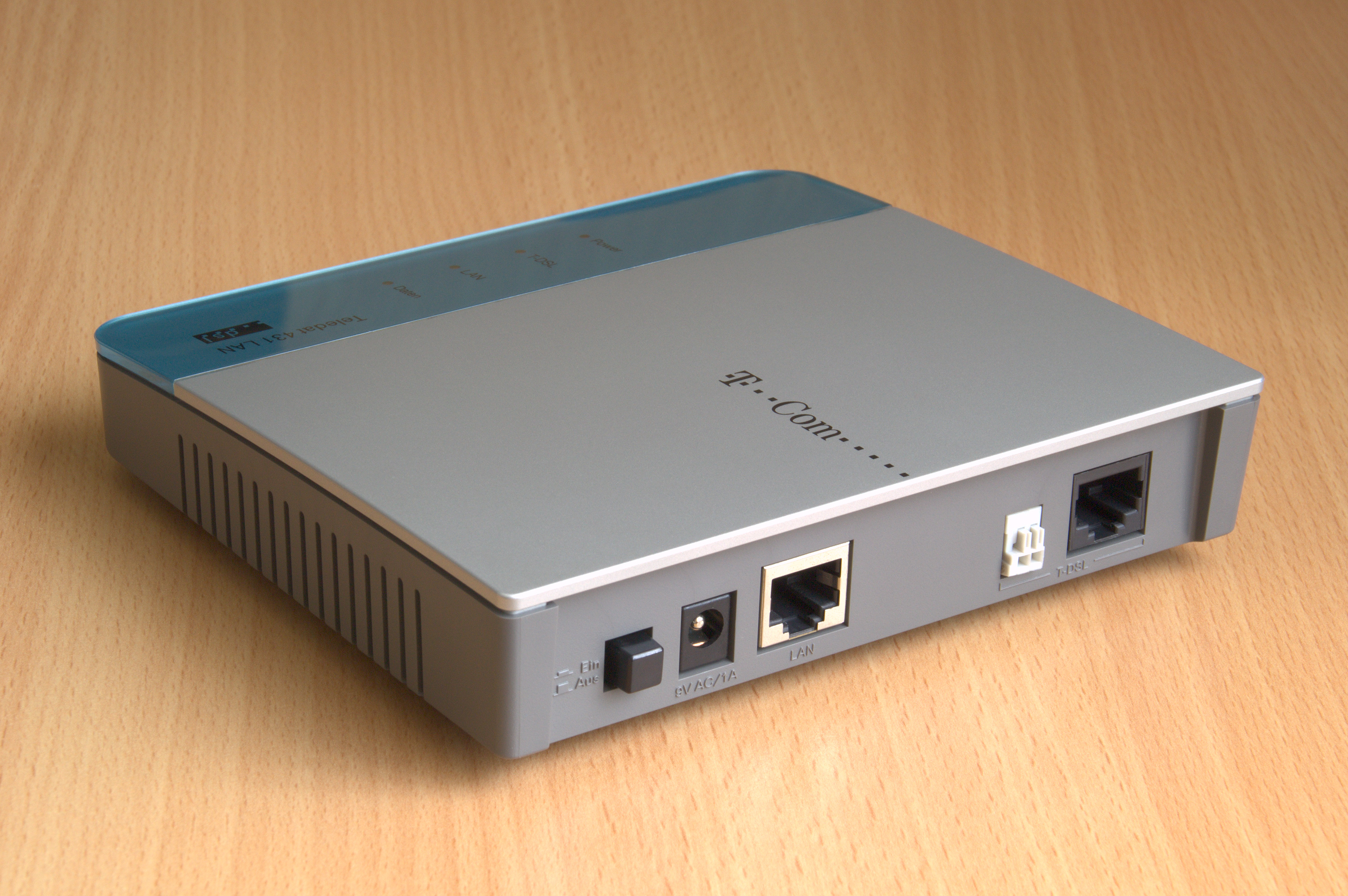 DSL-Modem Teledat 431 LAN der Deutschen Telekom, Rückansicht